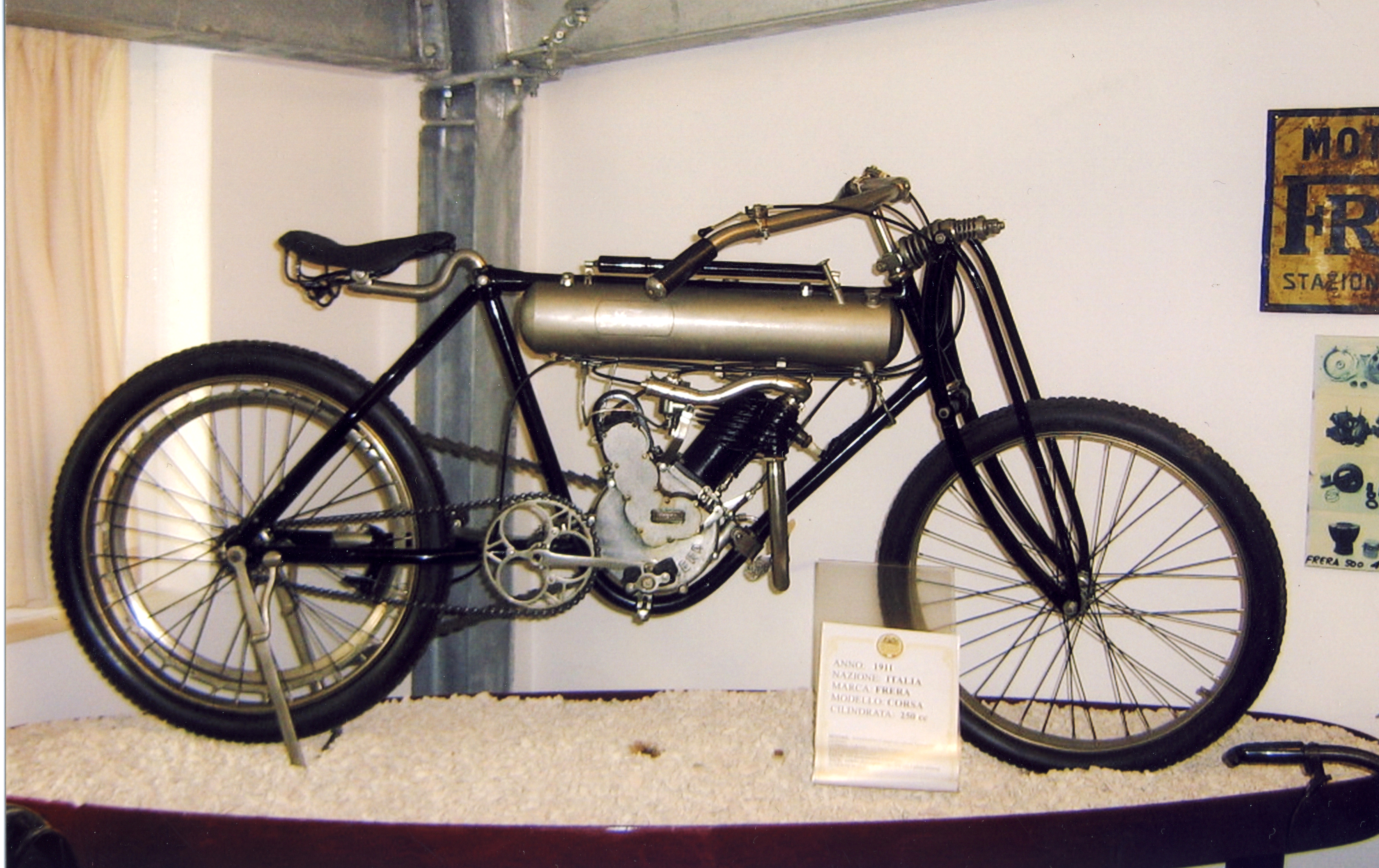 La Frera Corsa 250cc del 1911 esposta al Museo del Motociclo di Rimini